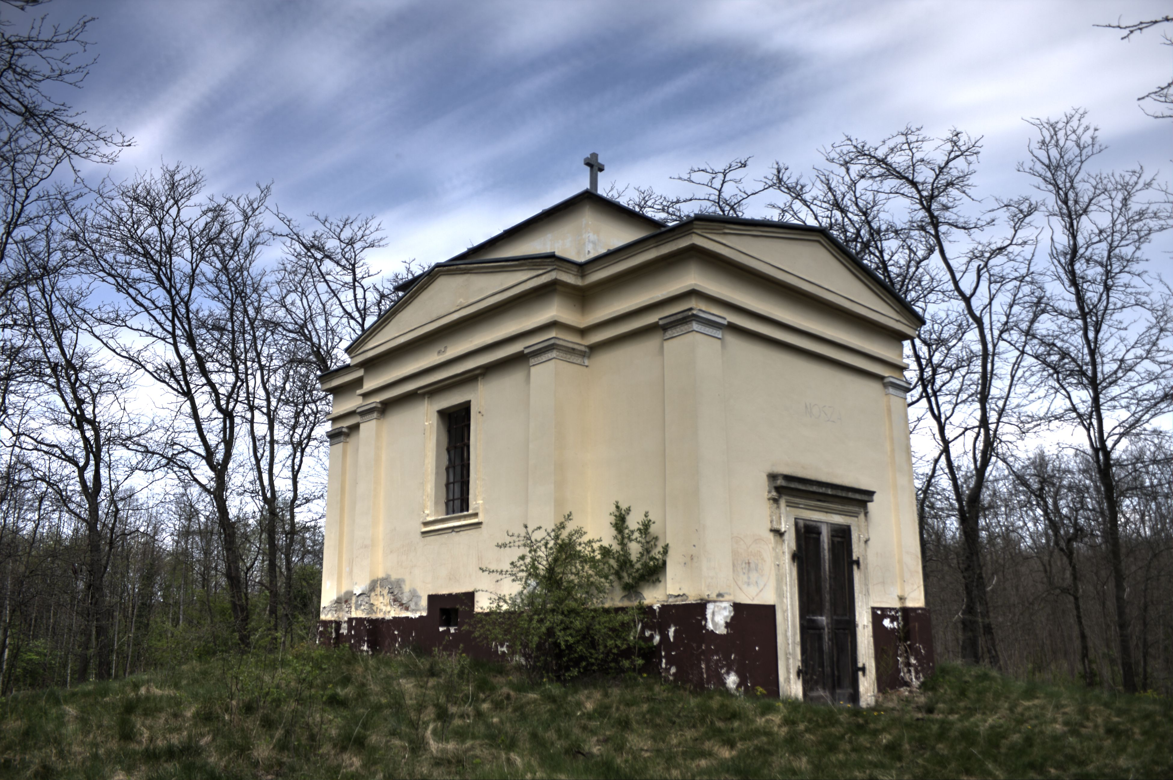 A kund család temetkezési helye.